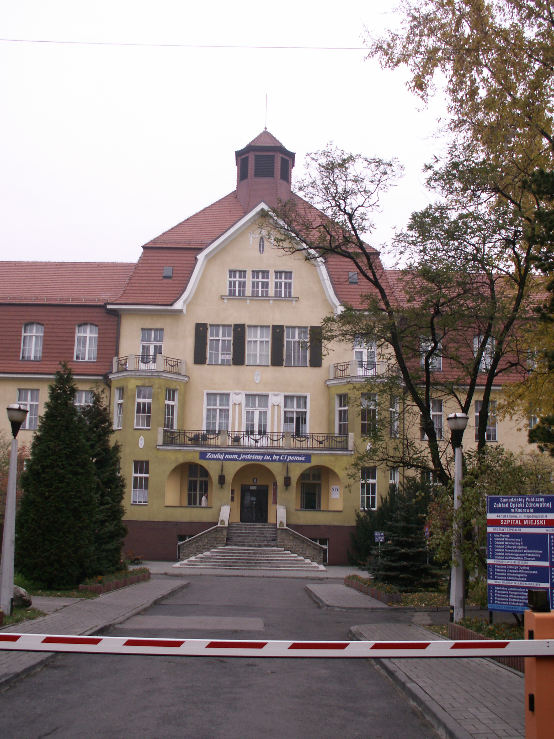 Szpital w Knurowie.